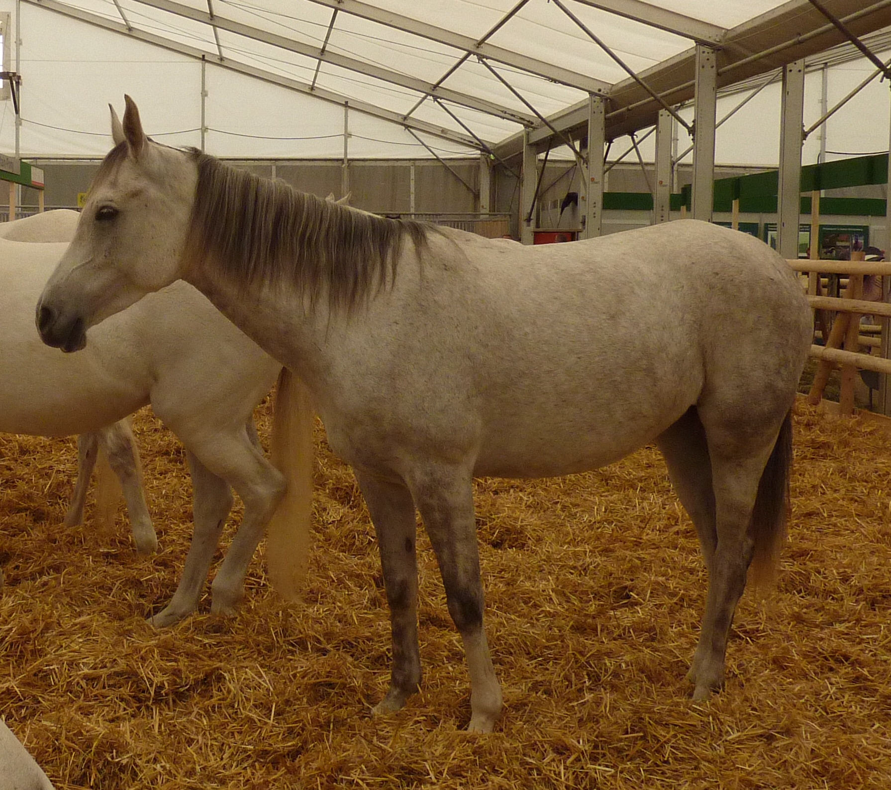 Landwirtschaftliches Hauptfest 2010, Marbacher Araberstute